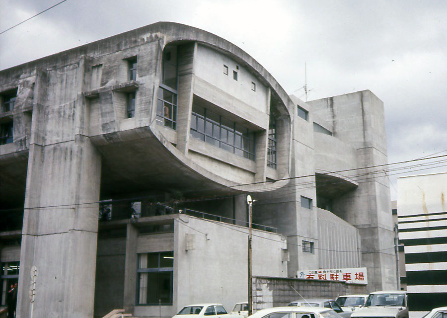 大分県医師会館を斜めから見る。1975年撮影。